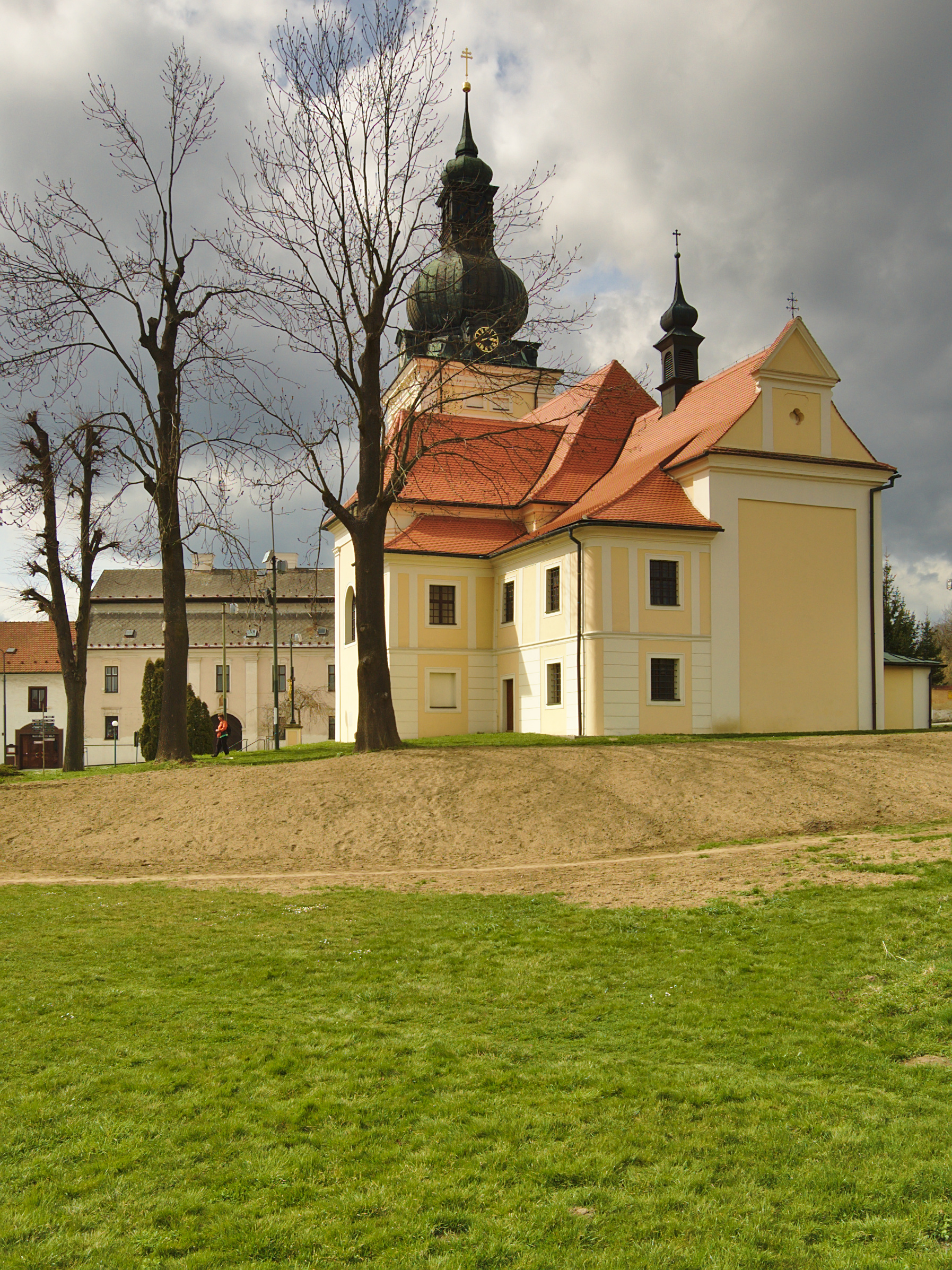 Kostel svatého Stanislava, Kunštát, okres Blansko